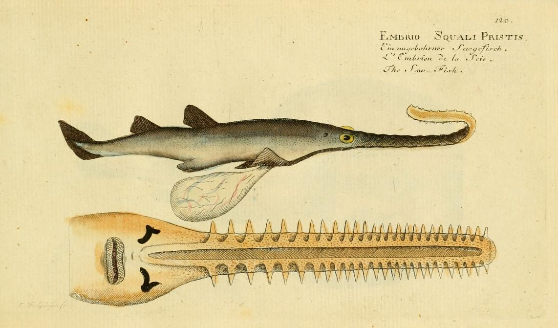 атлантический пилорыл Embryo of Pristis pristis